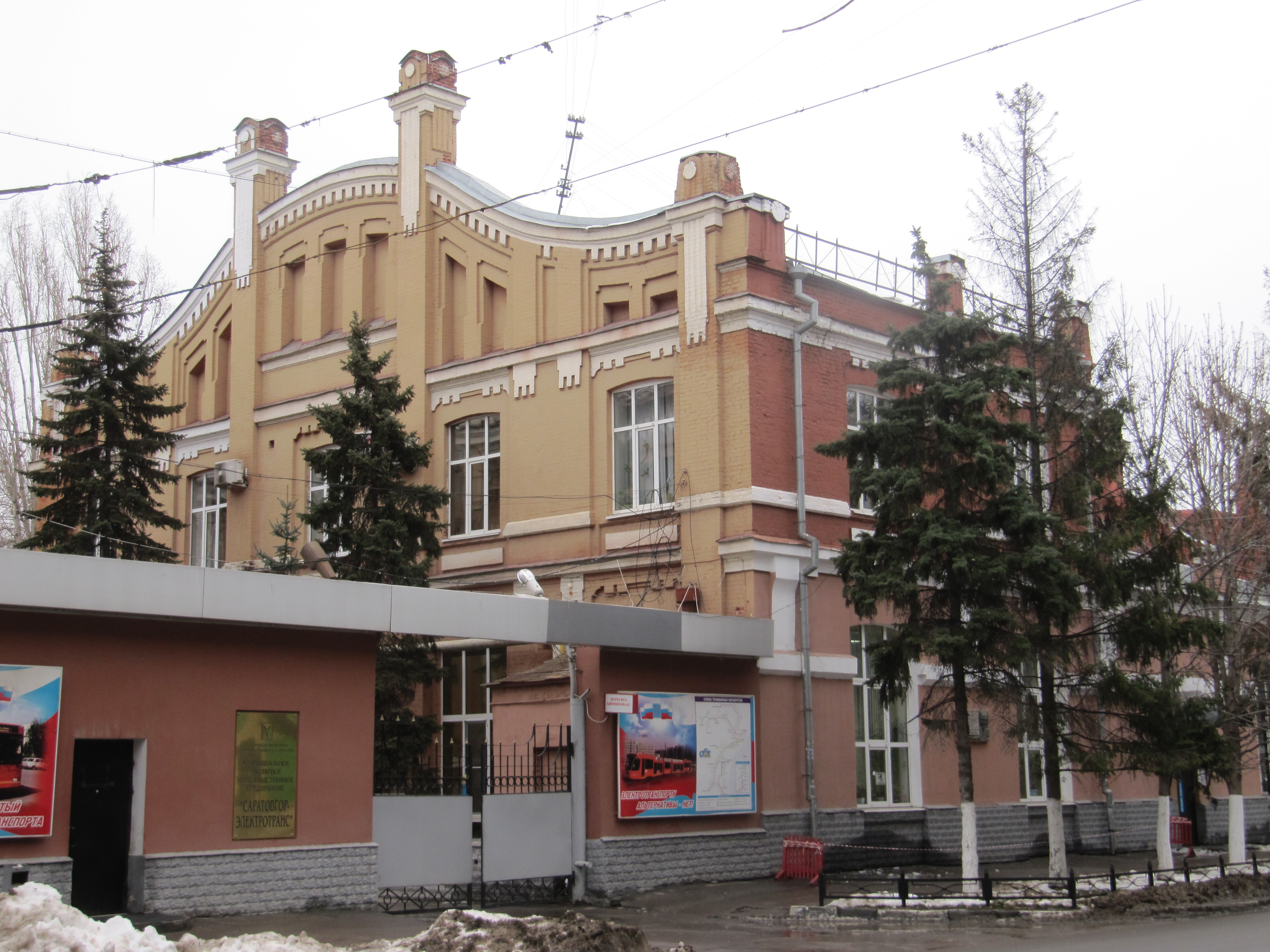 Саратовгорэлектротранс, улица Большая Казачья, 110, угол ул. Астраханская, Саратов.